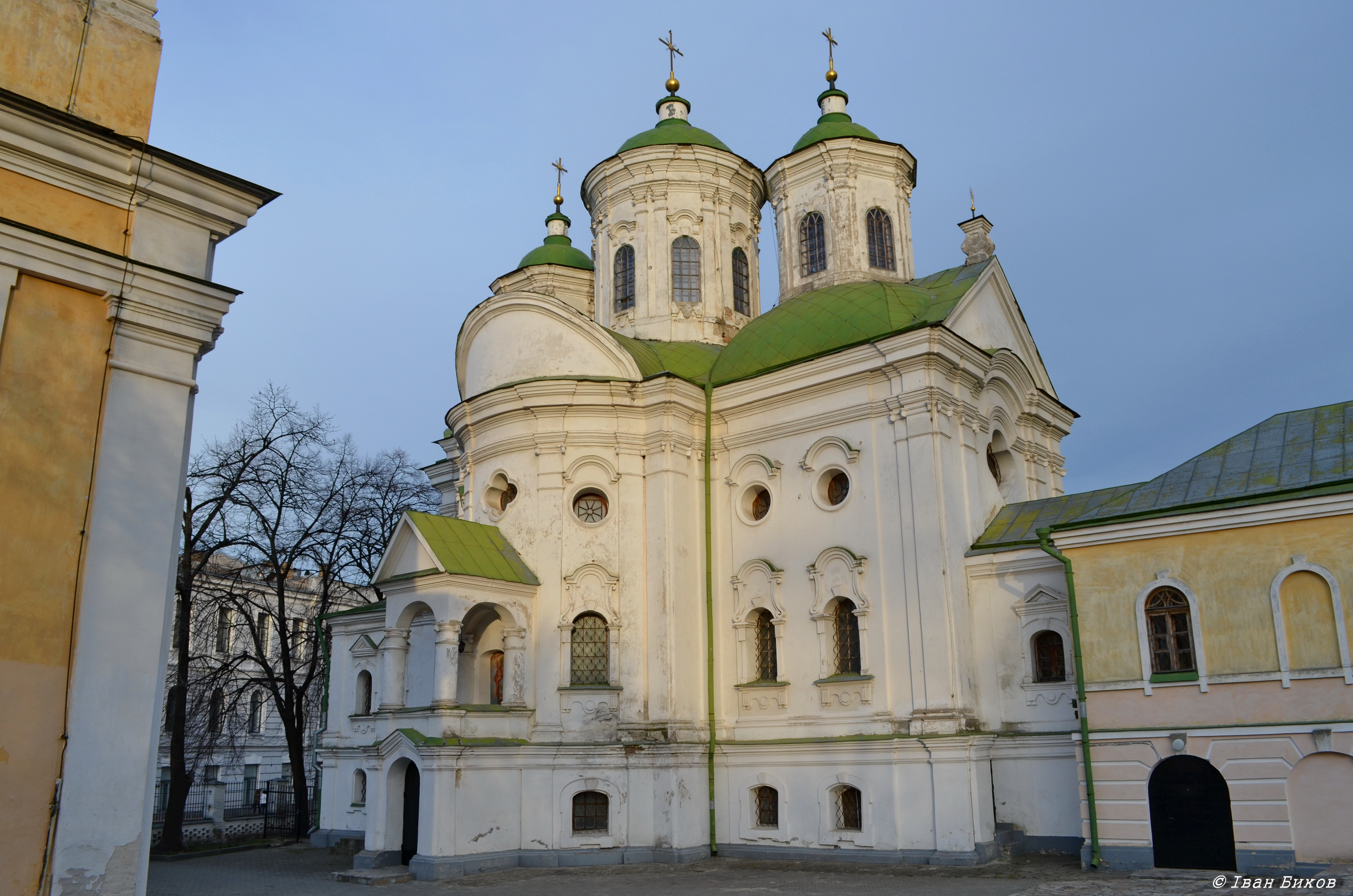 Покровська церква. 1766-72 роки. Українське бароко. Архітектор - Іван Григорович-Барський